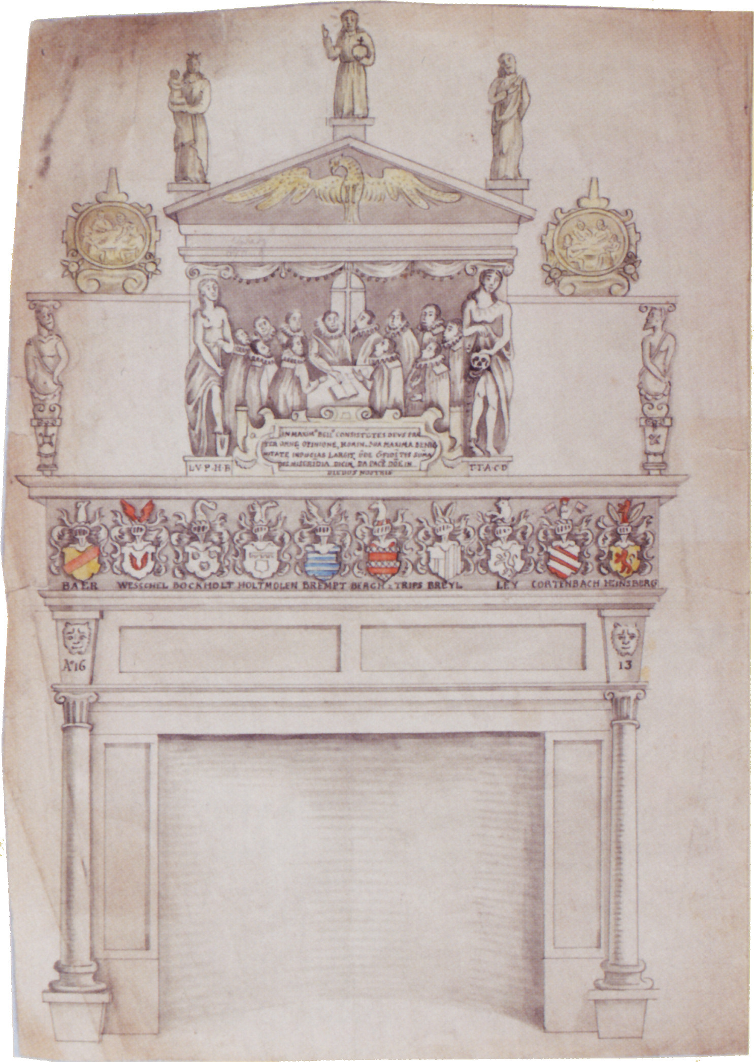 Zeichnung mit einer Darstellung des Kamins im Saal von Haus Vlassrath